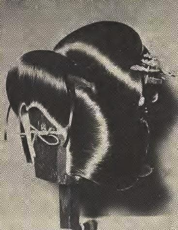 鬘。『累』の文金。Japanese Wig